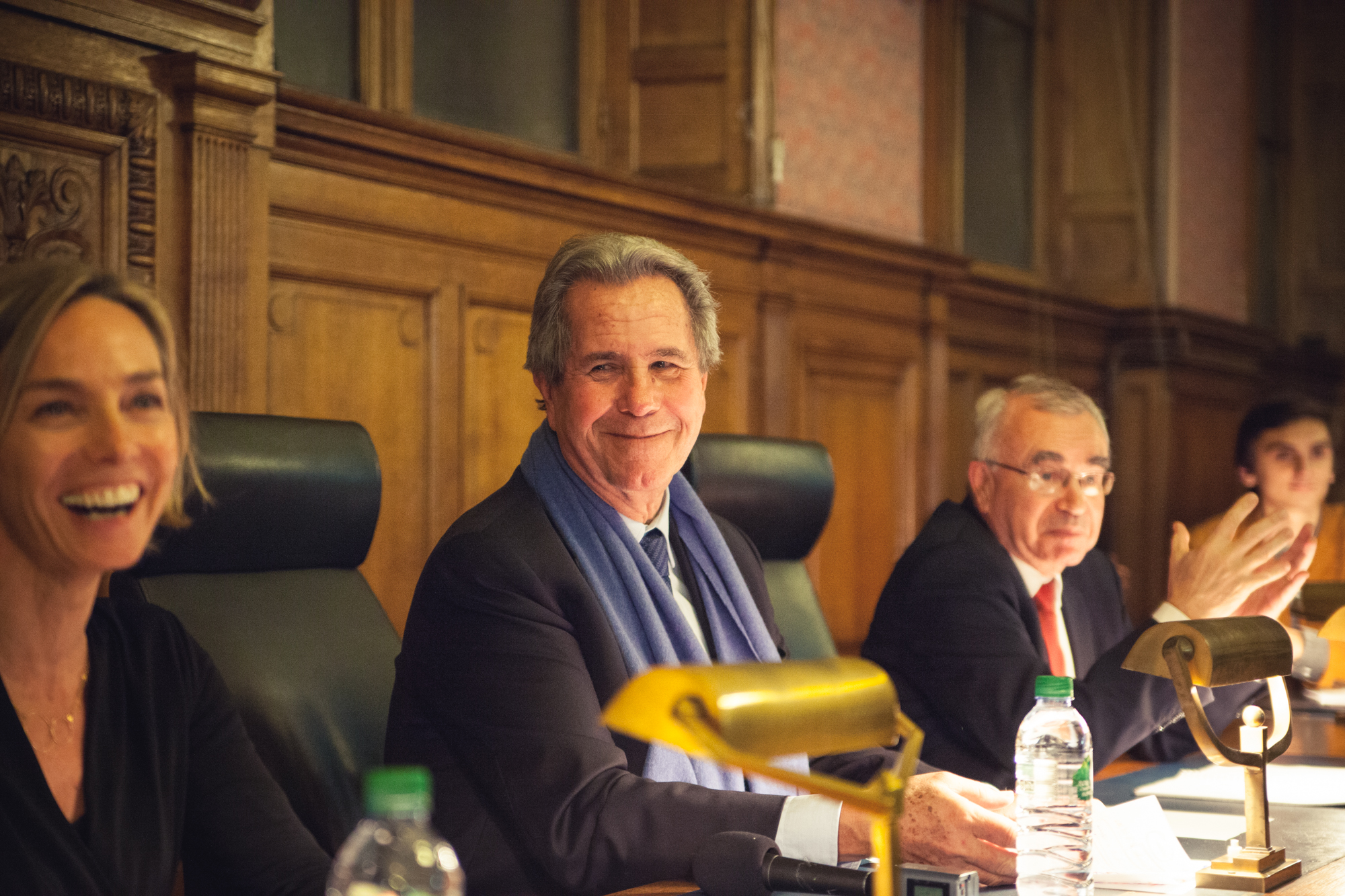 Jean Louis Debré lors du procès de Jésus